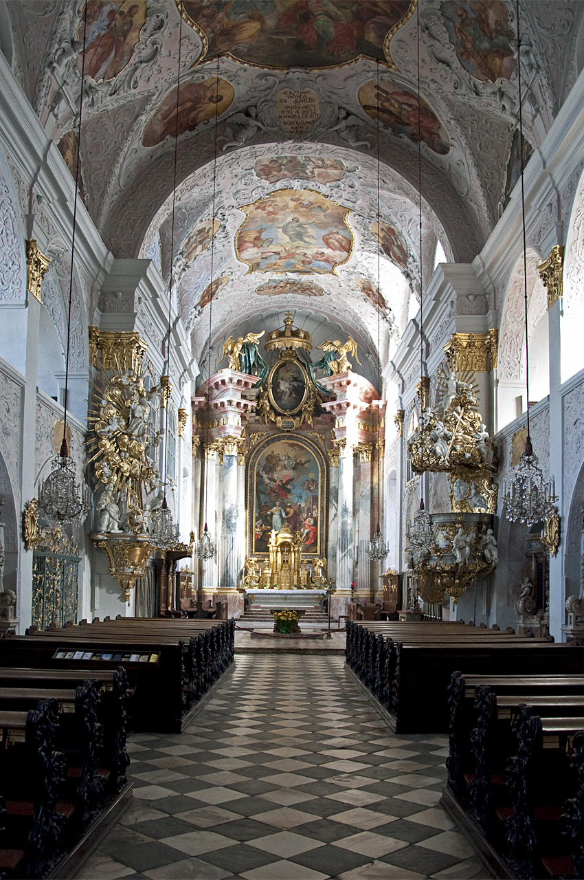 Klagenfurter Dom, Innenansicht